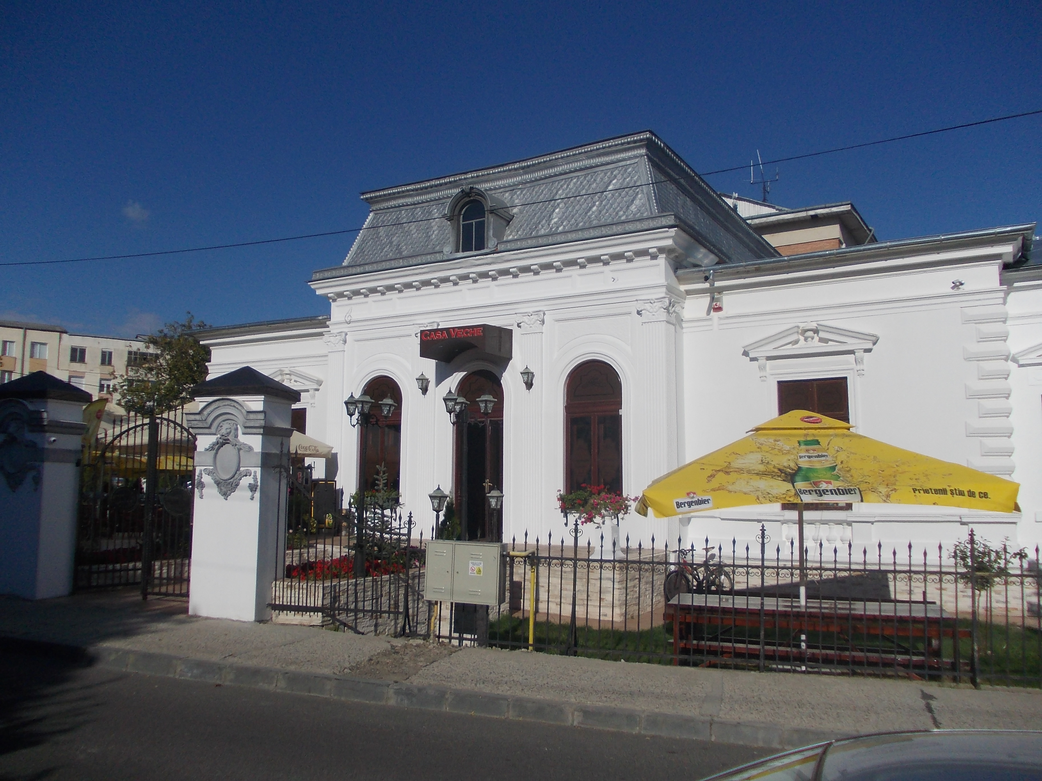 Casă, fost sediu al Jandarmeriei,azi restaurantul Casa Veche